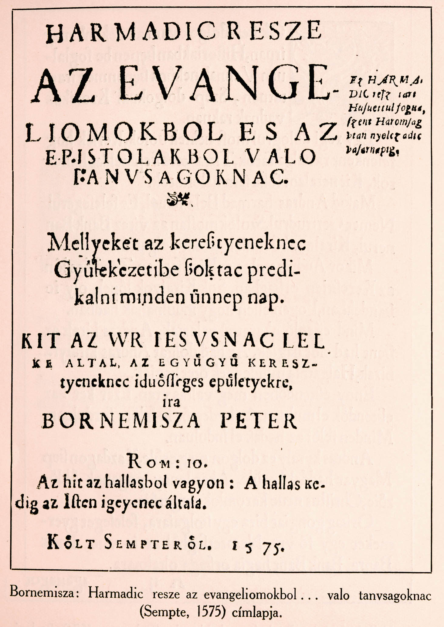 Bornemisza Péter: Postilla - Harmadik kötet.